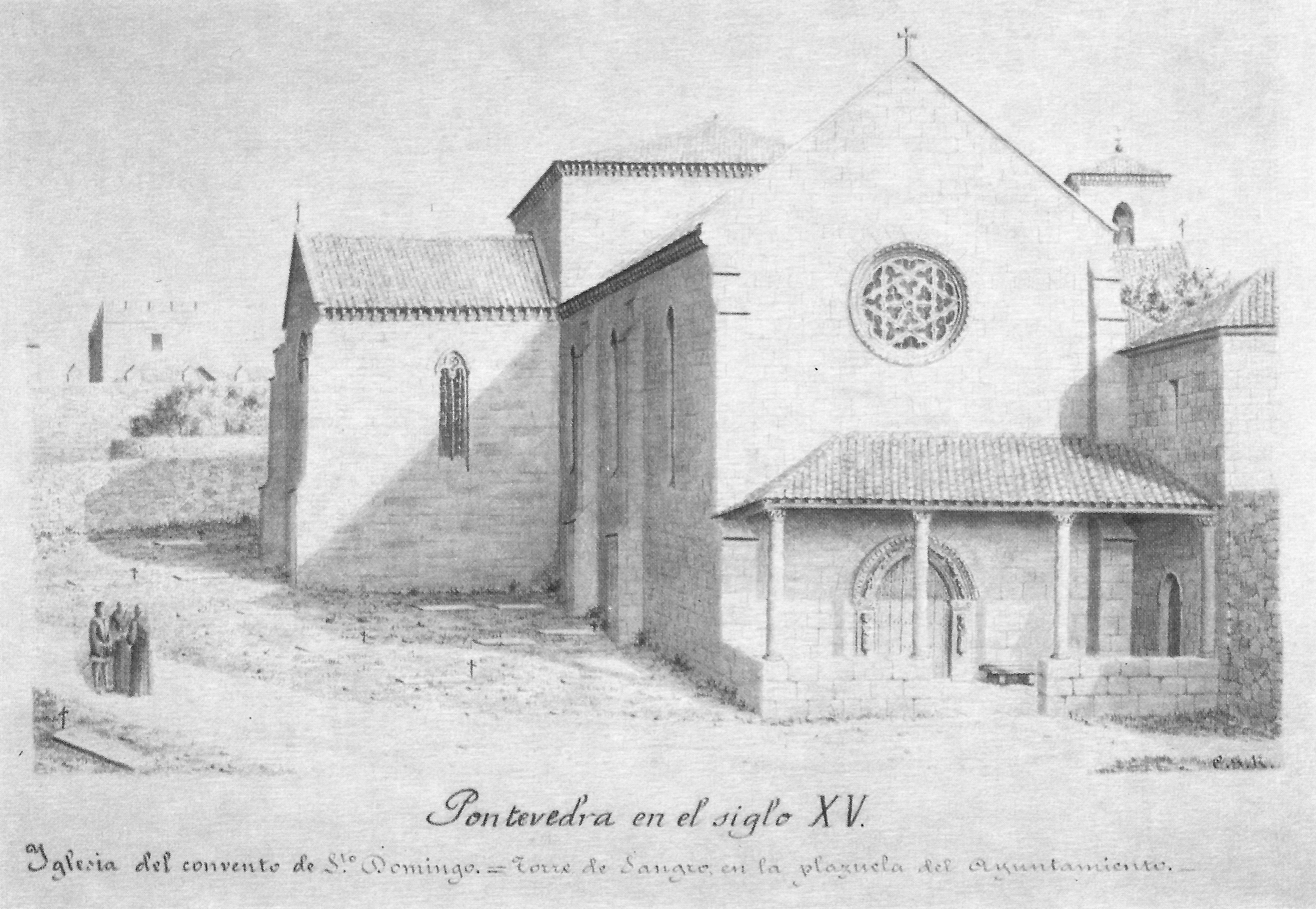 Igrexa do convento de San Domingos, no século XV. Debuxo de Celso García de la Riega (1844-1814)